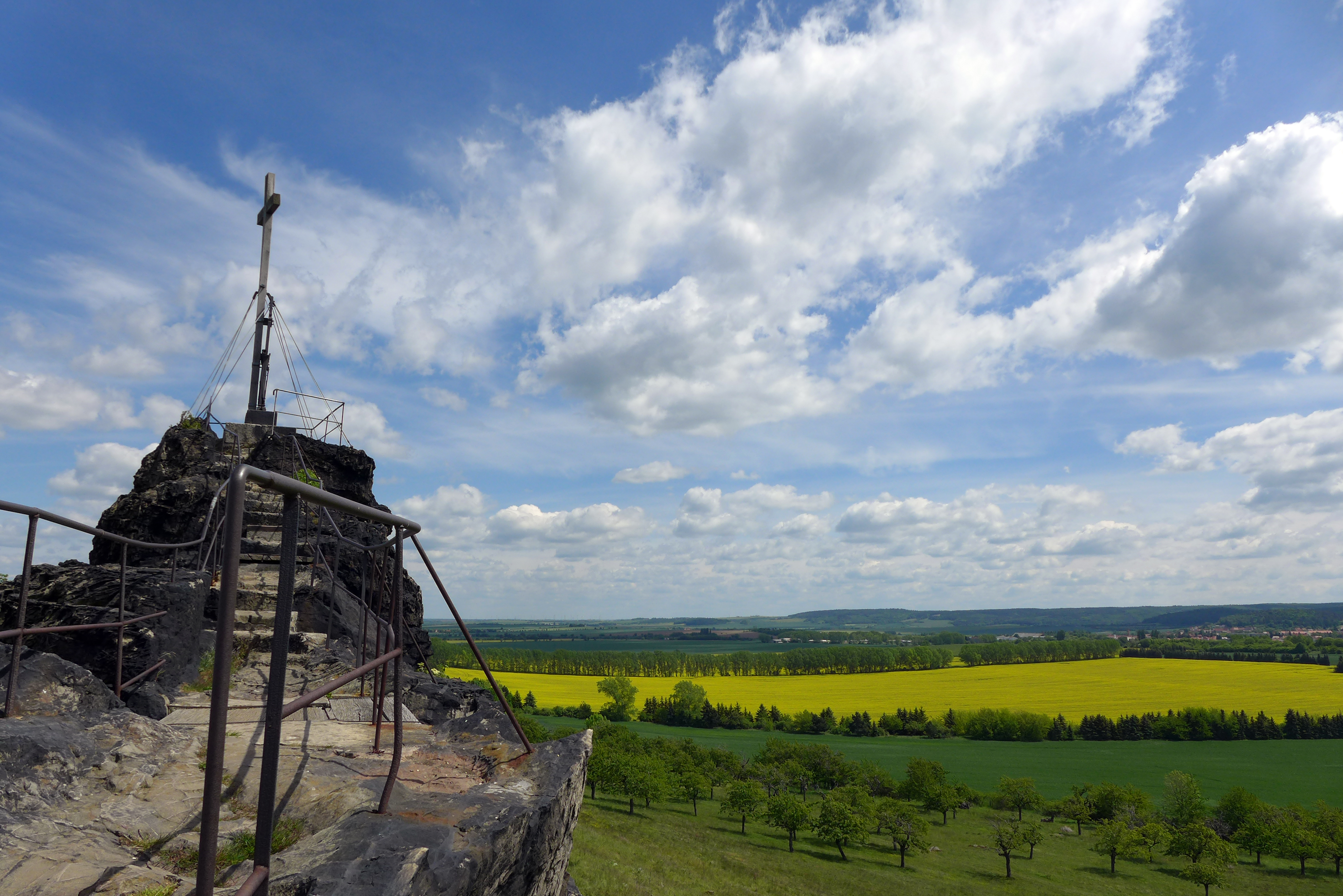 Weit geht der Blick vom Großen Gegenstein bei Ballenstedt über das nördliche Harzvorland.